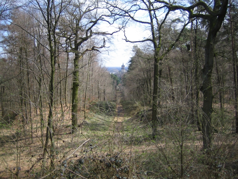 Blick vom sog. Sternberg auf dem Springenberg in Kleve durch eine Sichtachse des Neuen Tiergartens auf die Schwanenburg